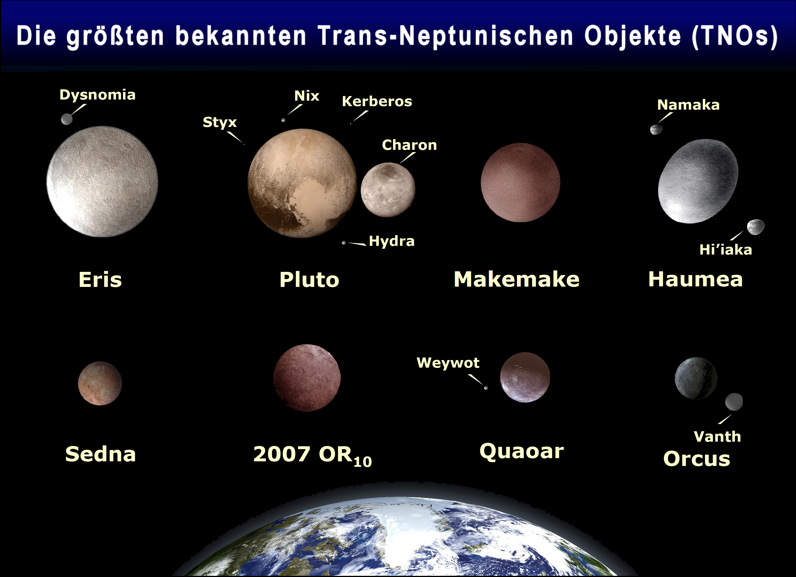 die größten bekannten Objekte im Kuipergürtel